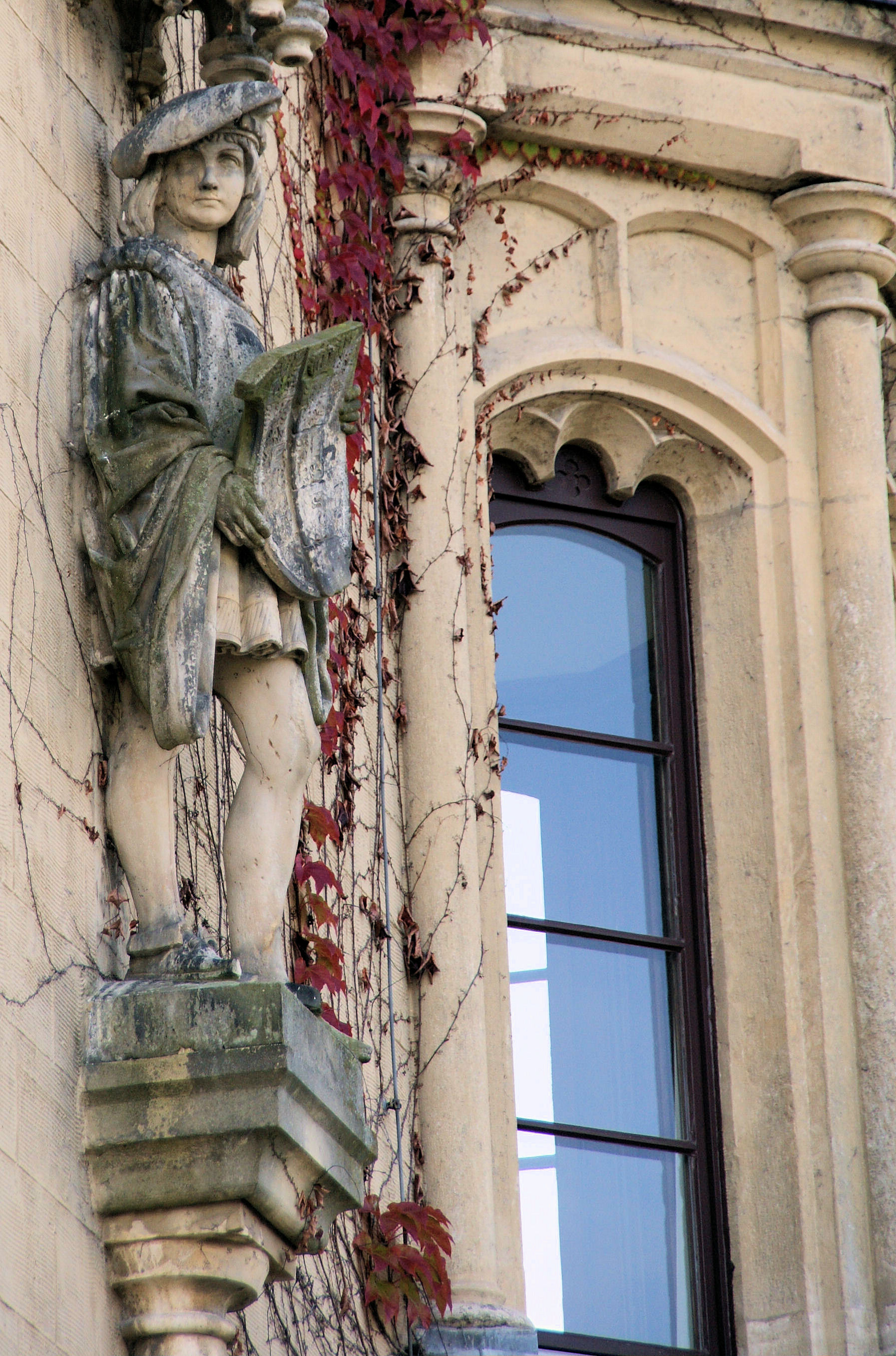 Königliche Villa in Regensburg, Adolf Schmetzer Straße 1, von König Maximilian II. 1854-56 erbaute Sommerresidenz, Wappenträger an der Nordfassade